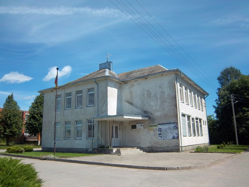 Palomenės seniūnija